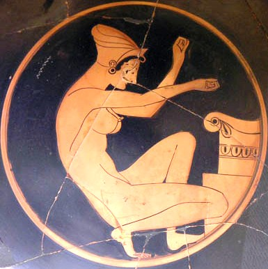 Particolare di questo file caricato su commons: File:AGMA Kylix femme autel.jpg